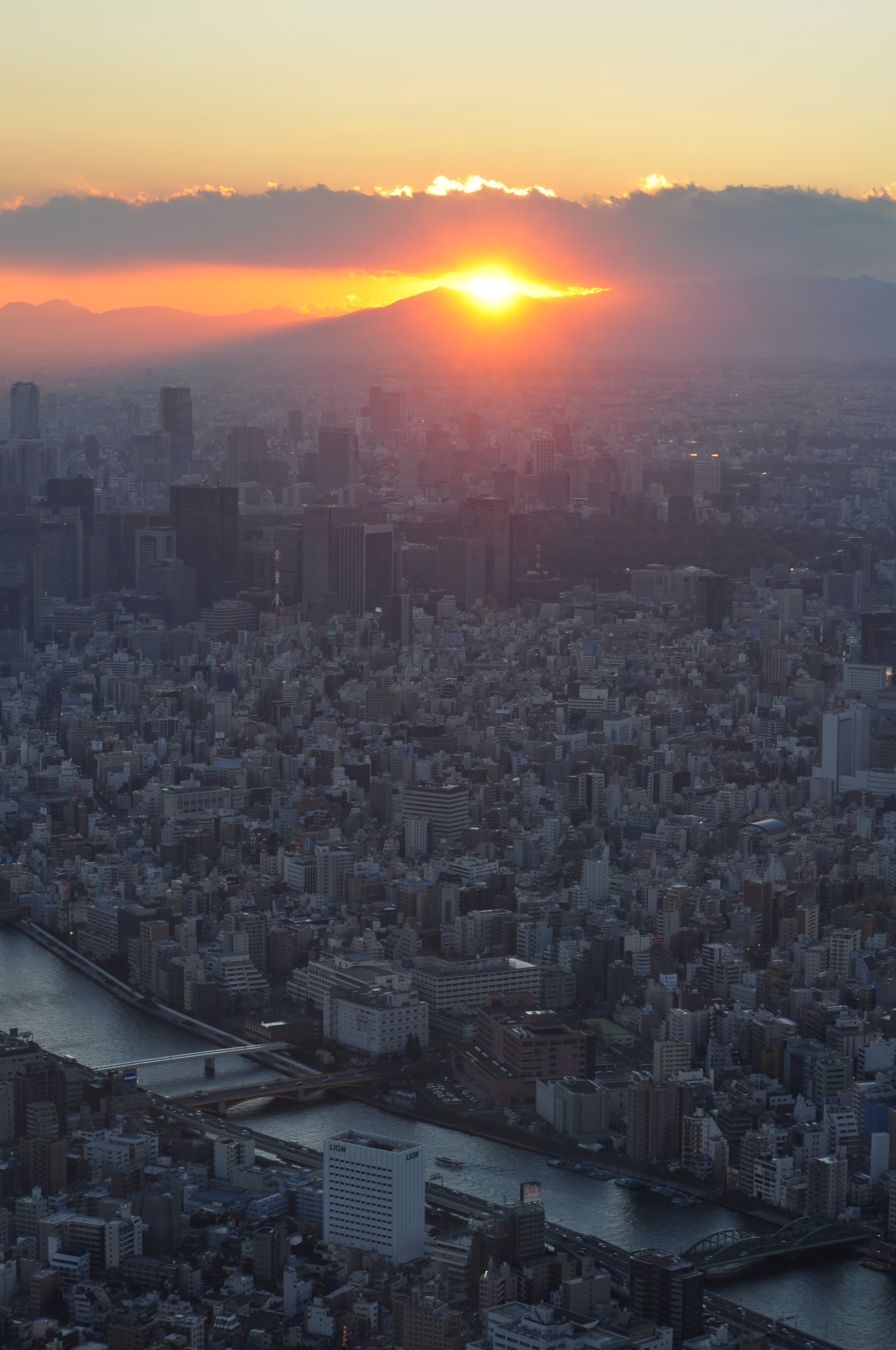 展望デッキから富士山の頂上に沈む太陽、ダイヤモンド富士です。